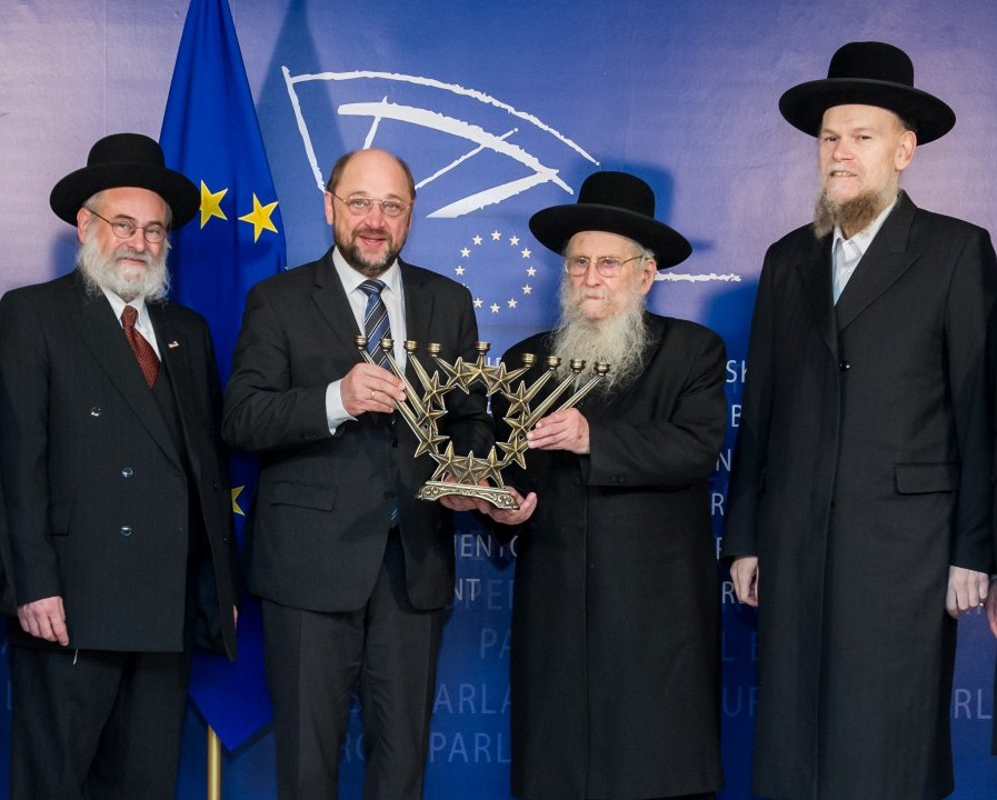 ראשי מרכז רבני אירופה עם נשיא הפרלמנט האירופי, מר מרטין שולץ